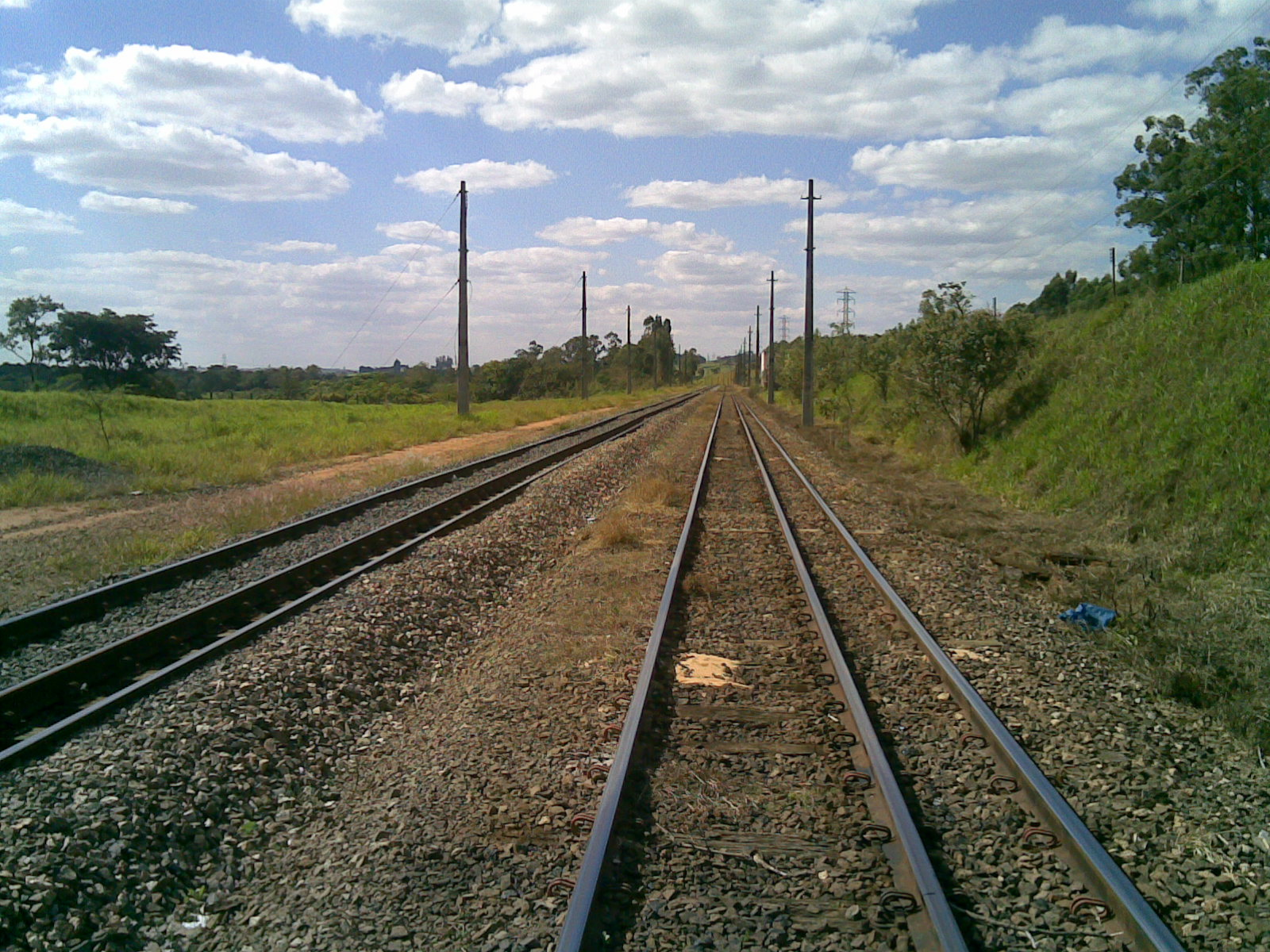 Pátio da Estação Ferroviária de Salto na Variante Boa Vista-Guaianã km 210-211.